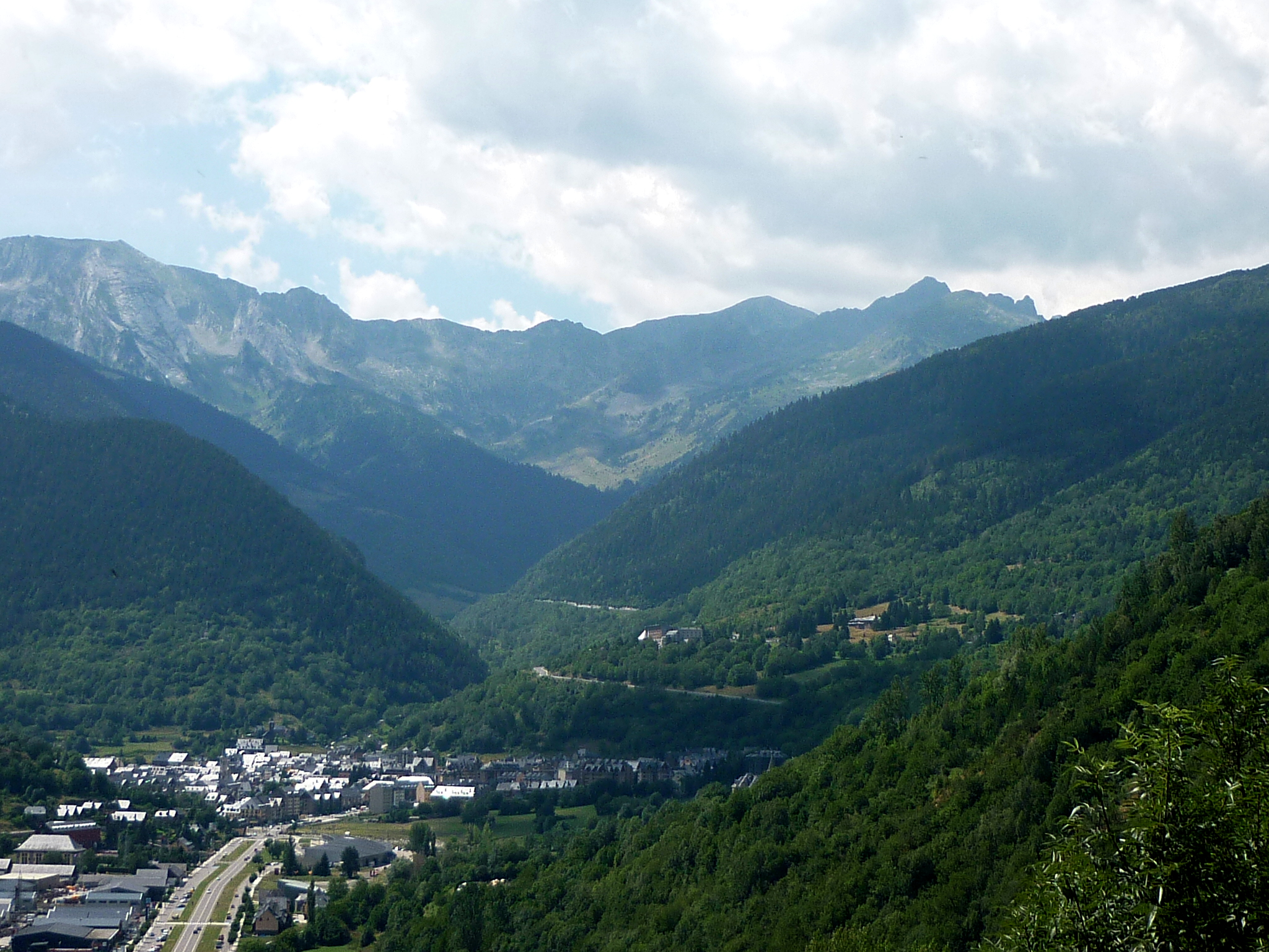 Vielha, vall del riu Nere i port de Vielha des de Vilac (Vielha e Mijaran)